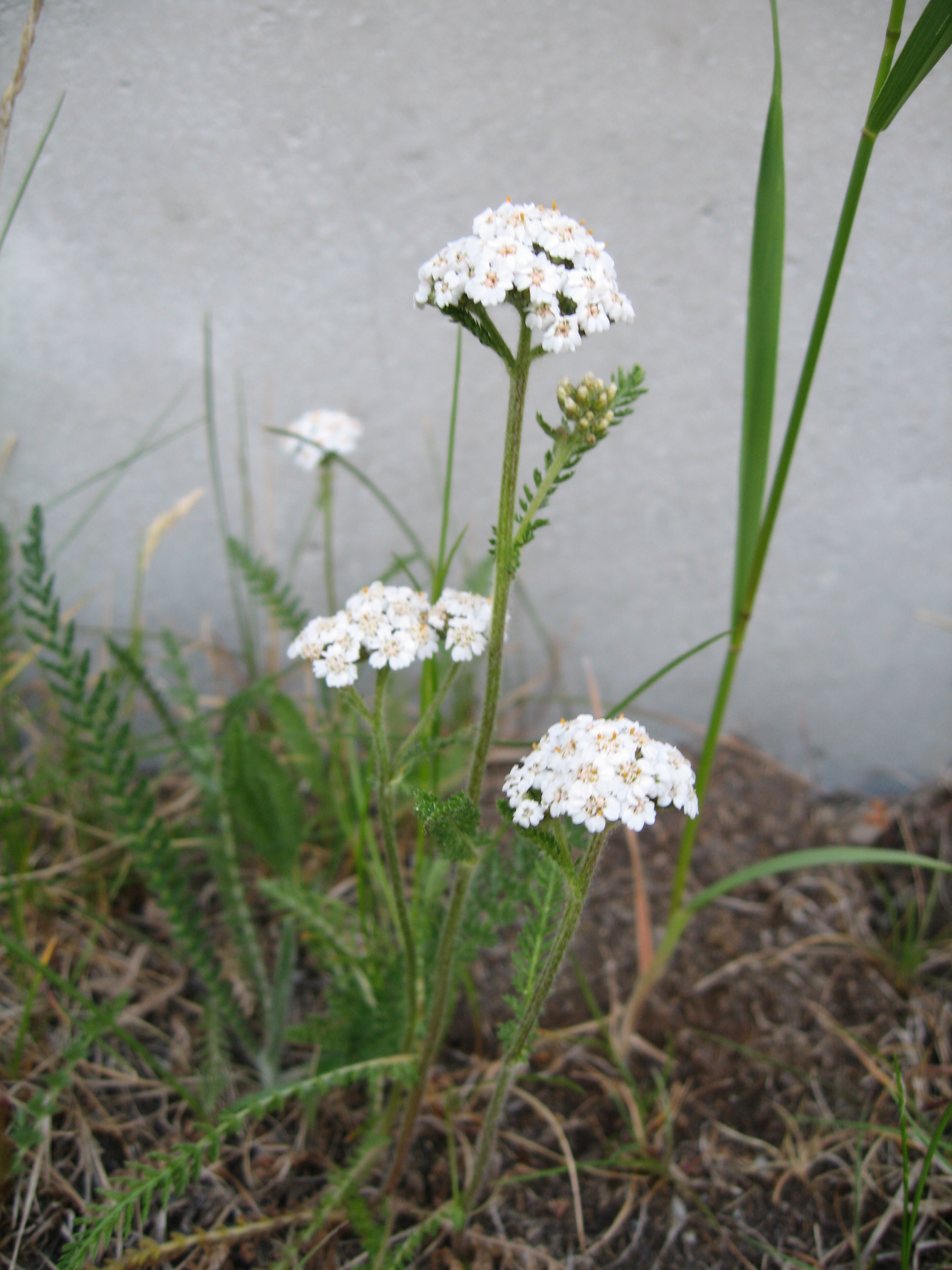 Ryllik